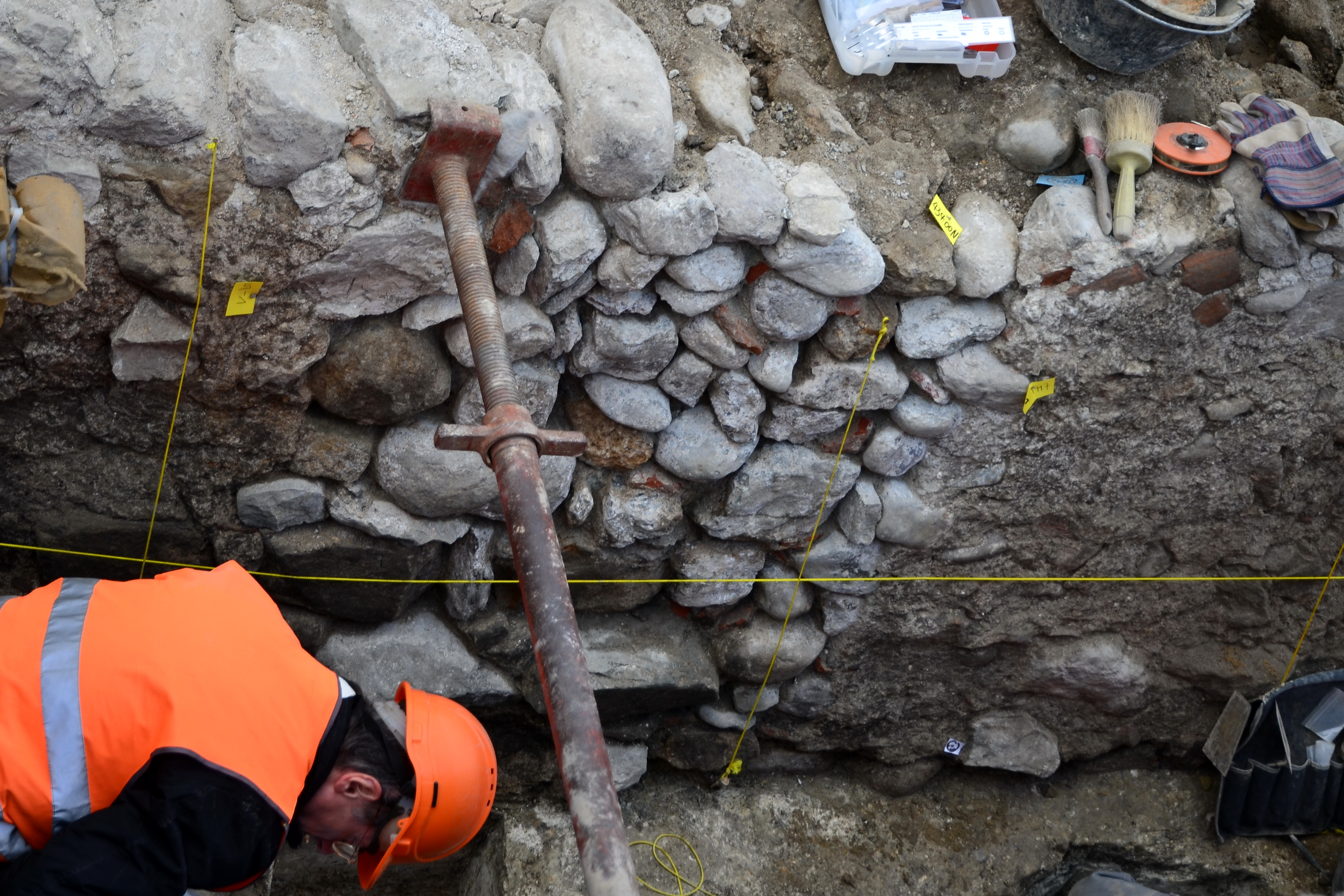 Archäologische Grabung Fraumünsterquartier, Stadthausquai in Zürich (Switzerland)